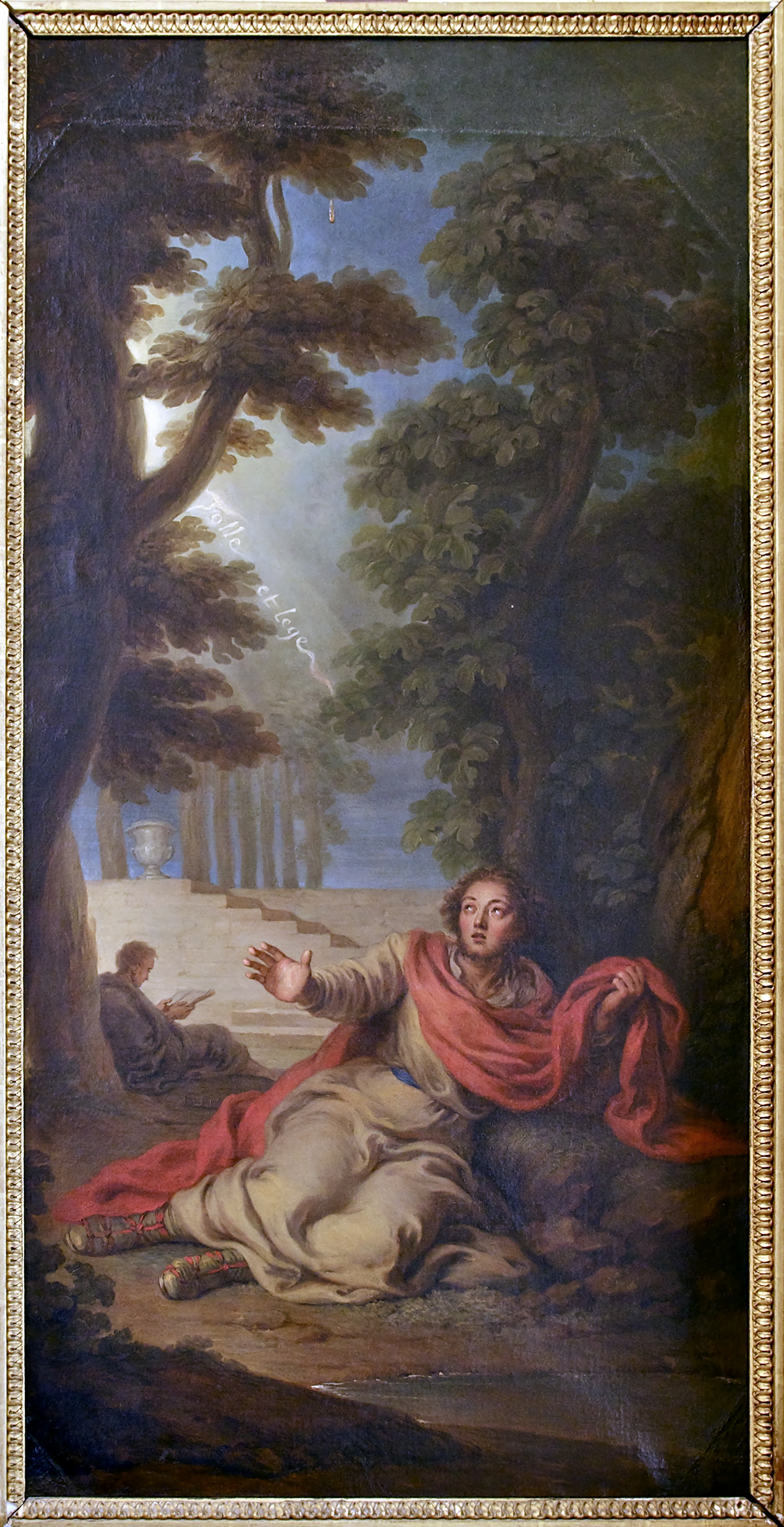 Tableau réalisé en 1736 pour les petits cabinets de la reine Marie Lecszinska au Château de Versailles. Encadrement original (légèrement coupé).